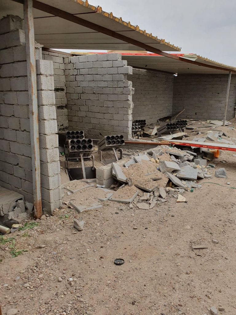 صاروخ كاتيوشا معد لقصف قاعدة التاجي